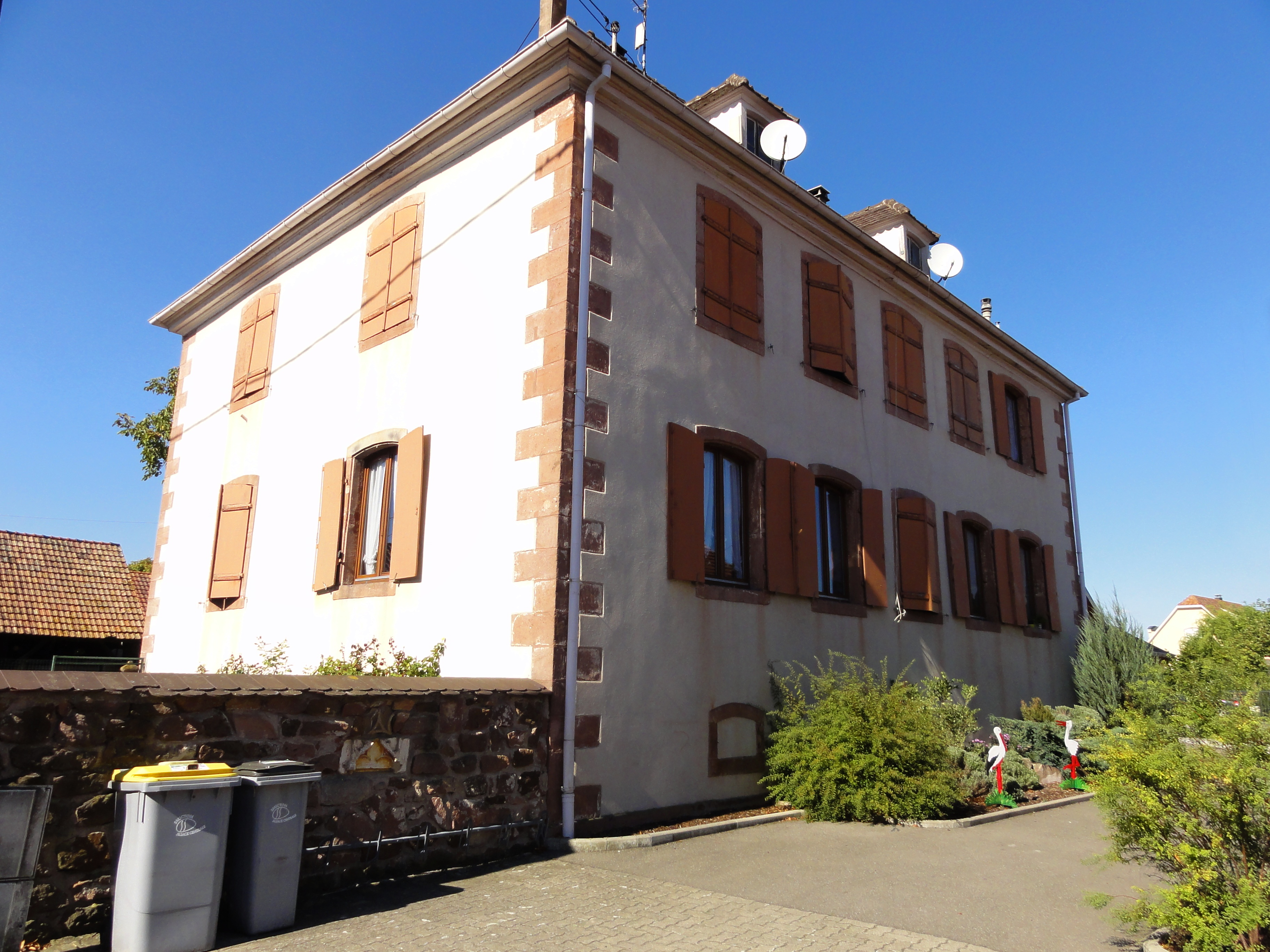 Alsace, Bas-Rhin, Schwobsheim, Ancien presbytère (XVIIIe-XIXe), aujourd'hui école, 40 rue de l'Ecole. .